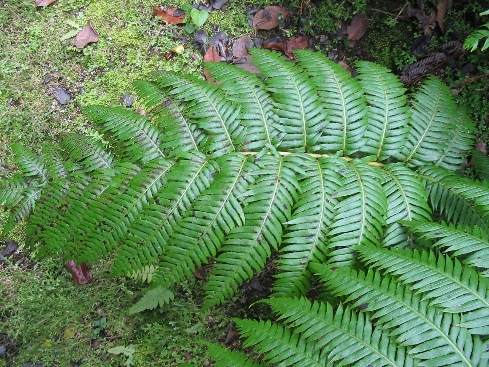 Wurzelnder Kettenfarn (Woodwardia radicans) - Leaf